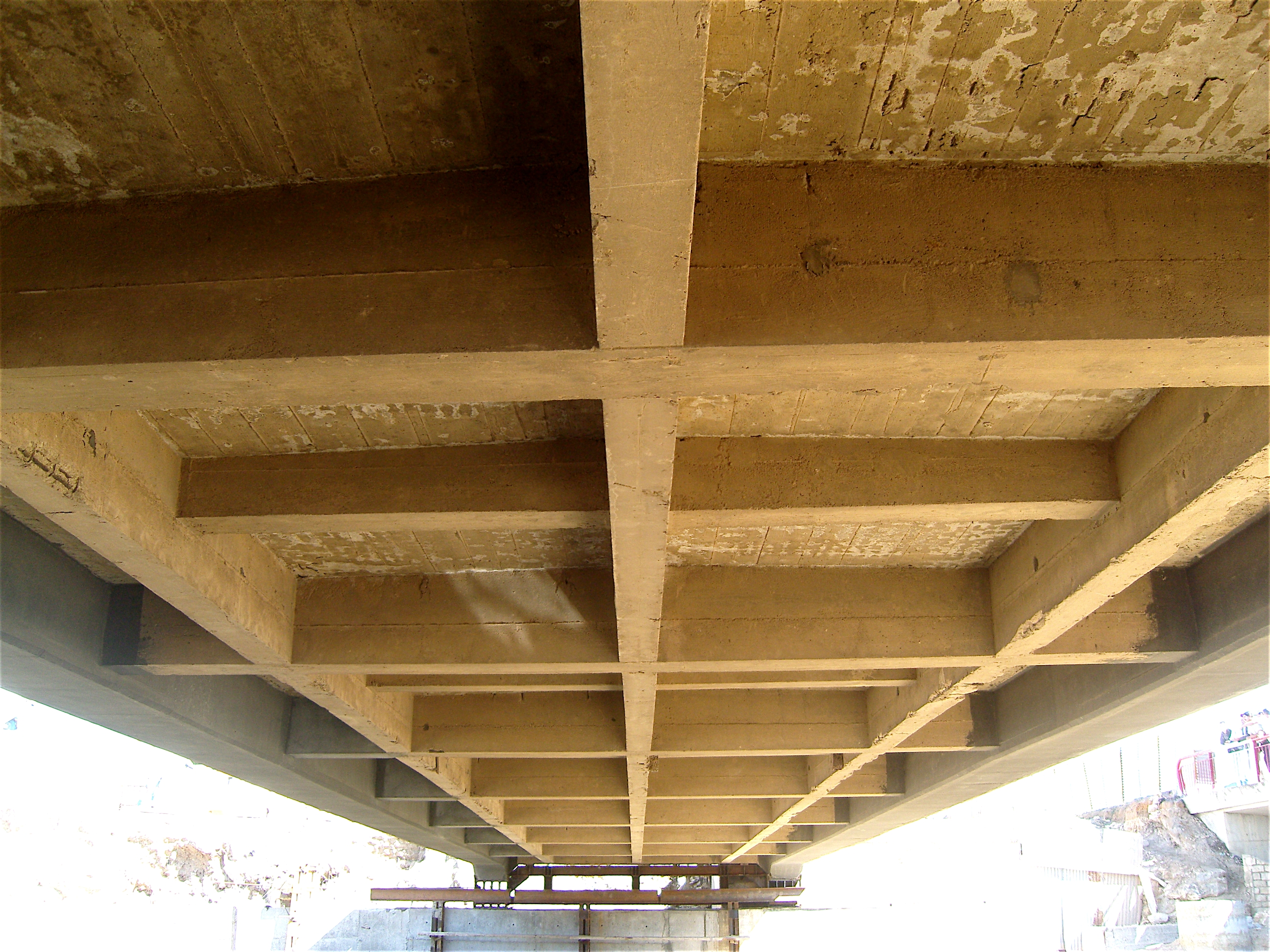 Tablier du pont en arc en béton armé datant de 1931 dans la ville de Korba en Tunisie.